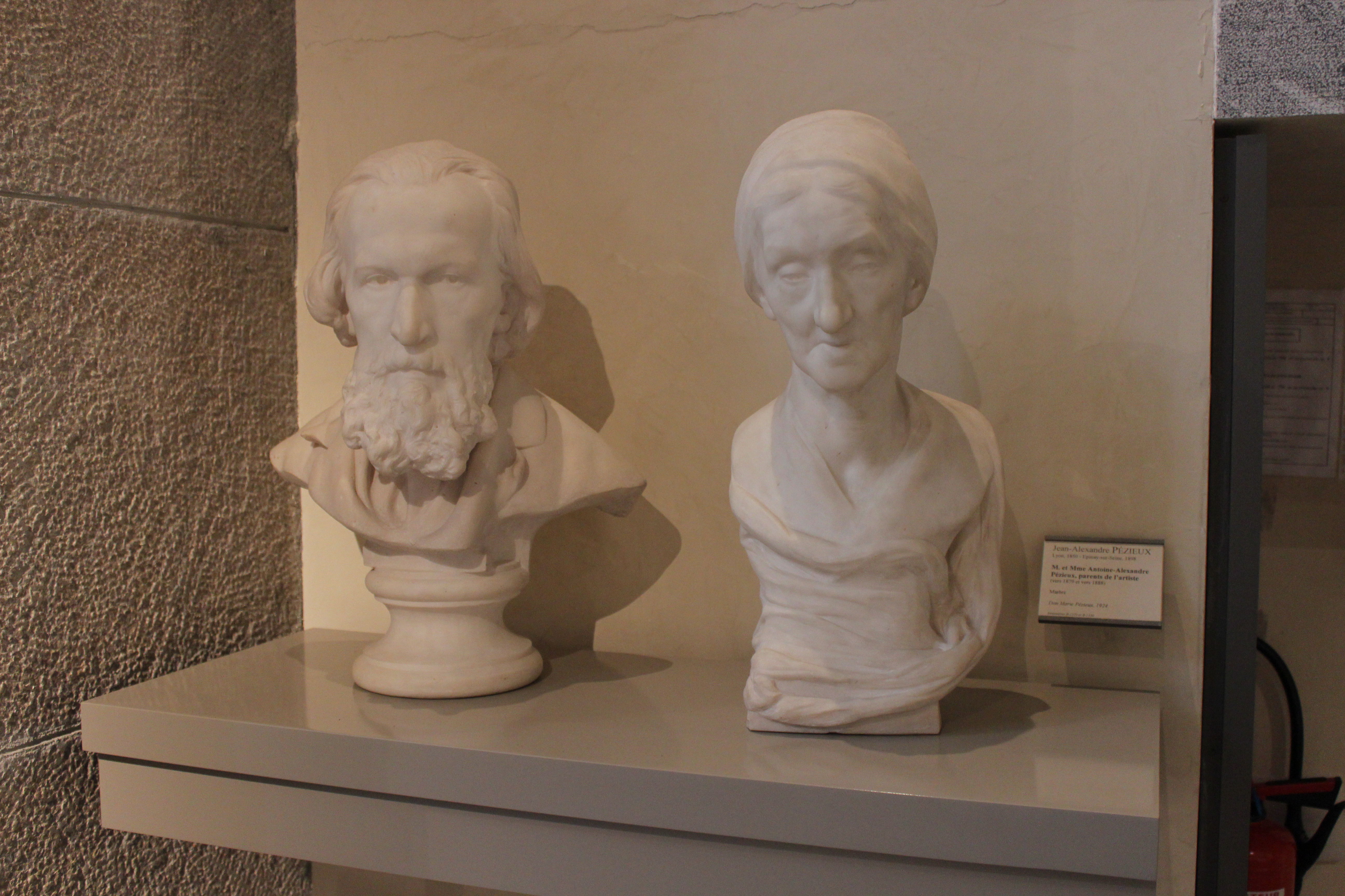 Bustes des parents de Jean-Alexandre Pézieux, par lui-même.